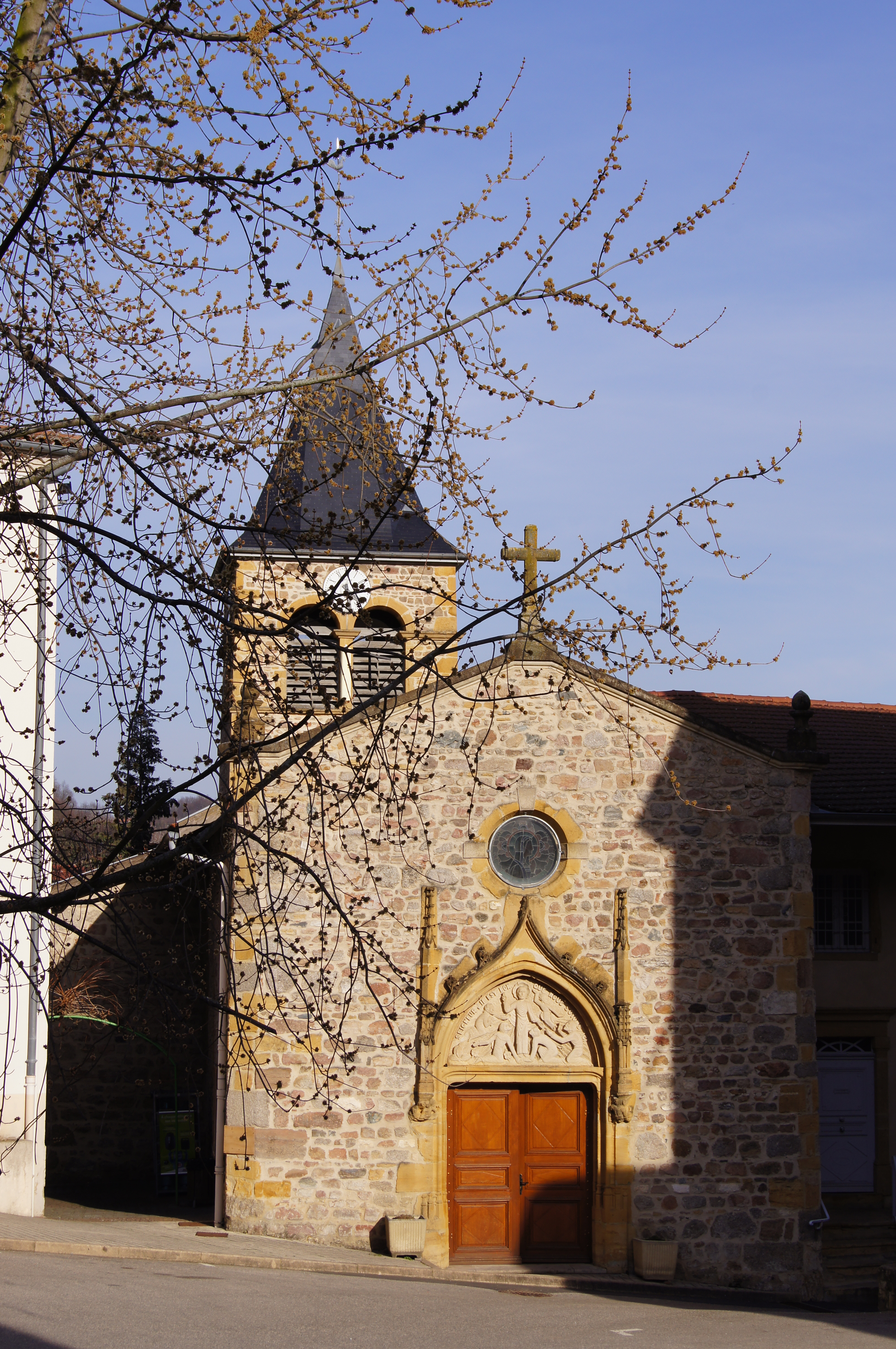 l'église d'Ancy